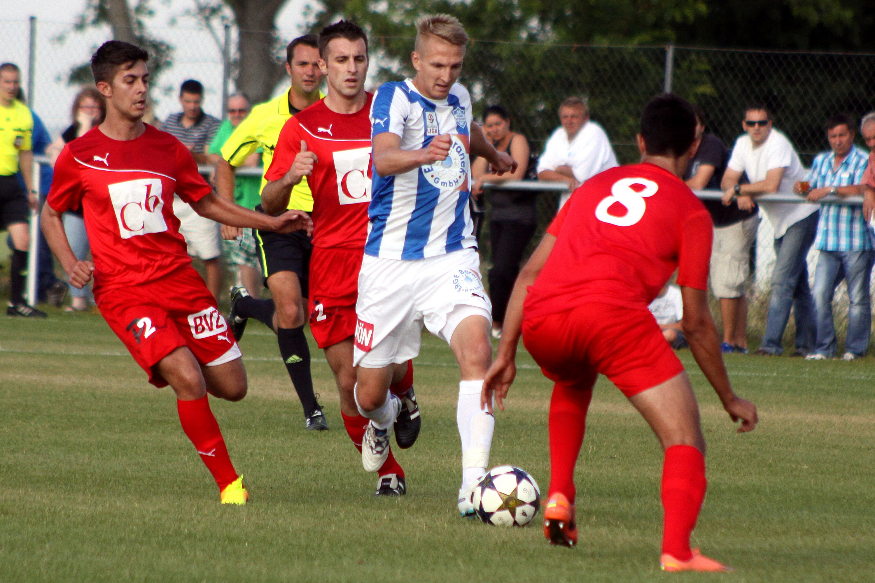 Österreichischer Fußball-Cup 2013/14 am 13. Juli 2013 – ASV Draßburg vs. SC Wiener Neustadt 0:3 (0:2)